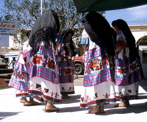 Bailable de sones mazatecos de Huautla de Jimenez